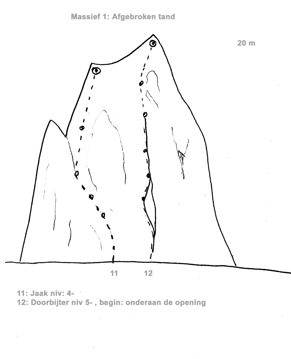 Voorbeeld van klimtopo - vrij te verbeteren